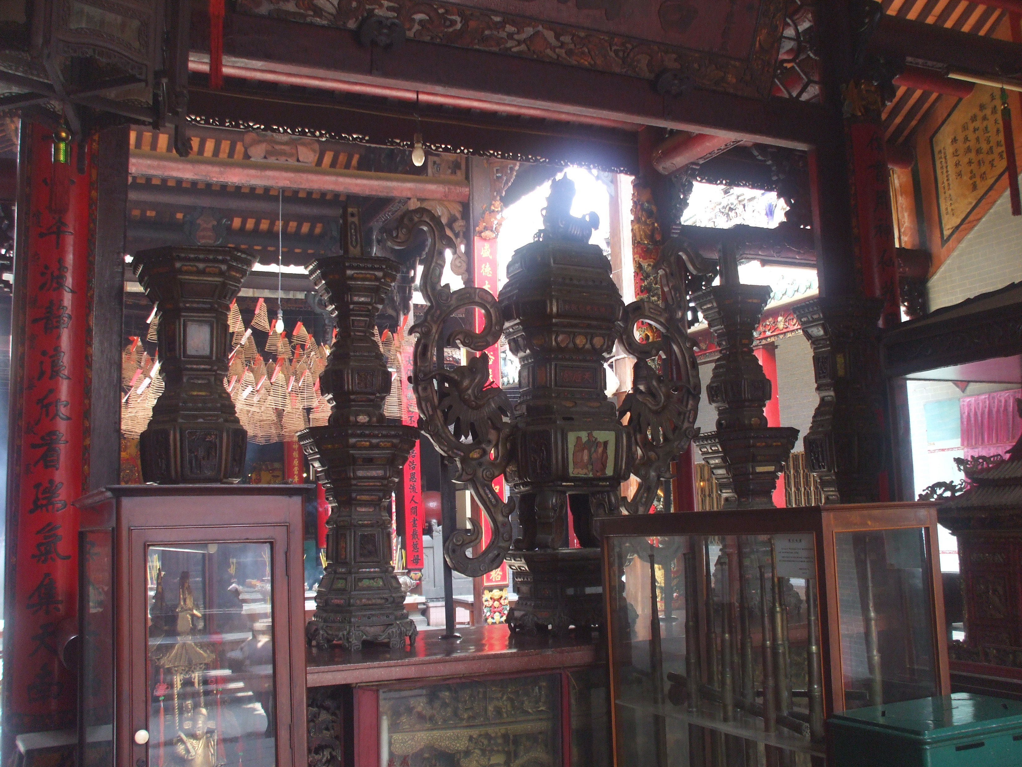 Bộ lư lớn niên hiệu Quang Tự thứ 12 (1886). Một cổ vật quí tại chùa Thiên Hậu, quận 5, Thành phố Hồ Chí Minh, Việt Nam.